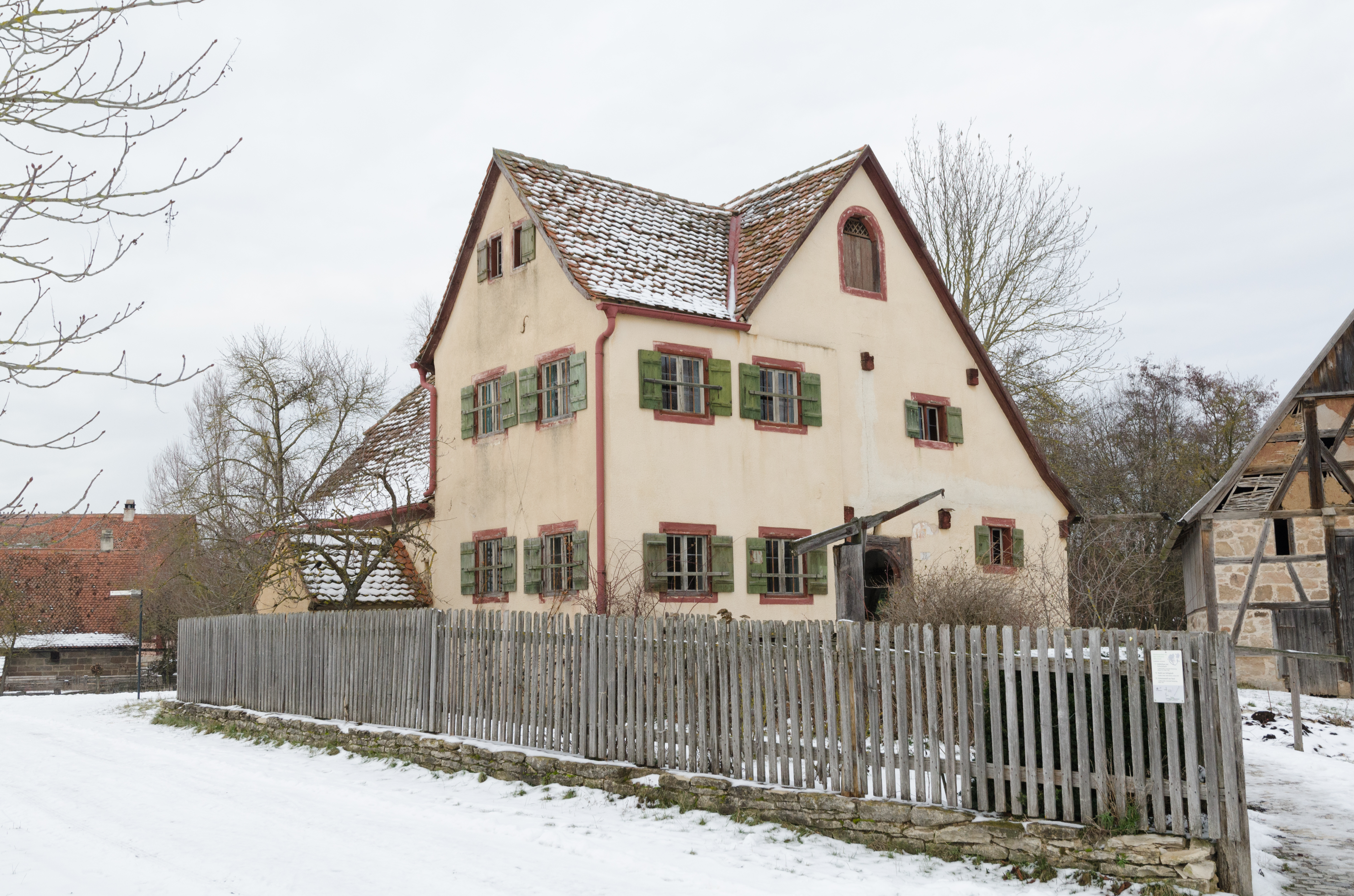 Bad Windsheim, Fränkisches Freilandmuseum, Nr. 077